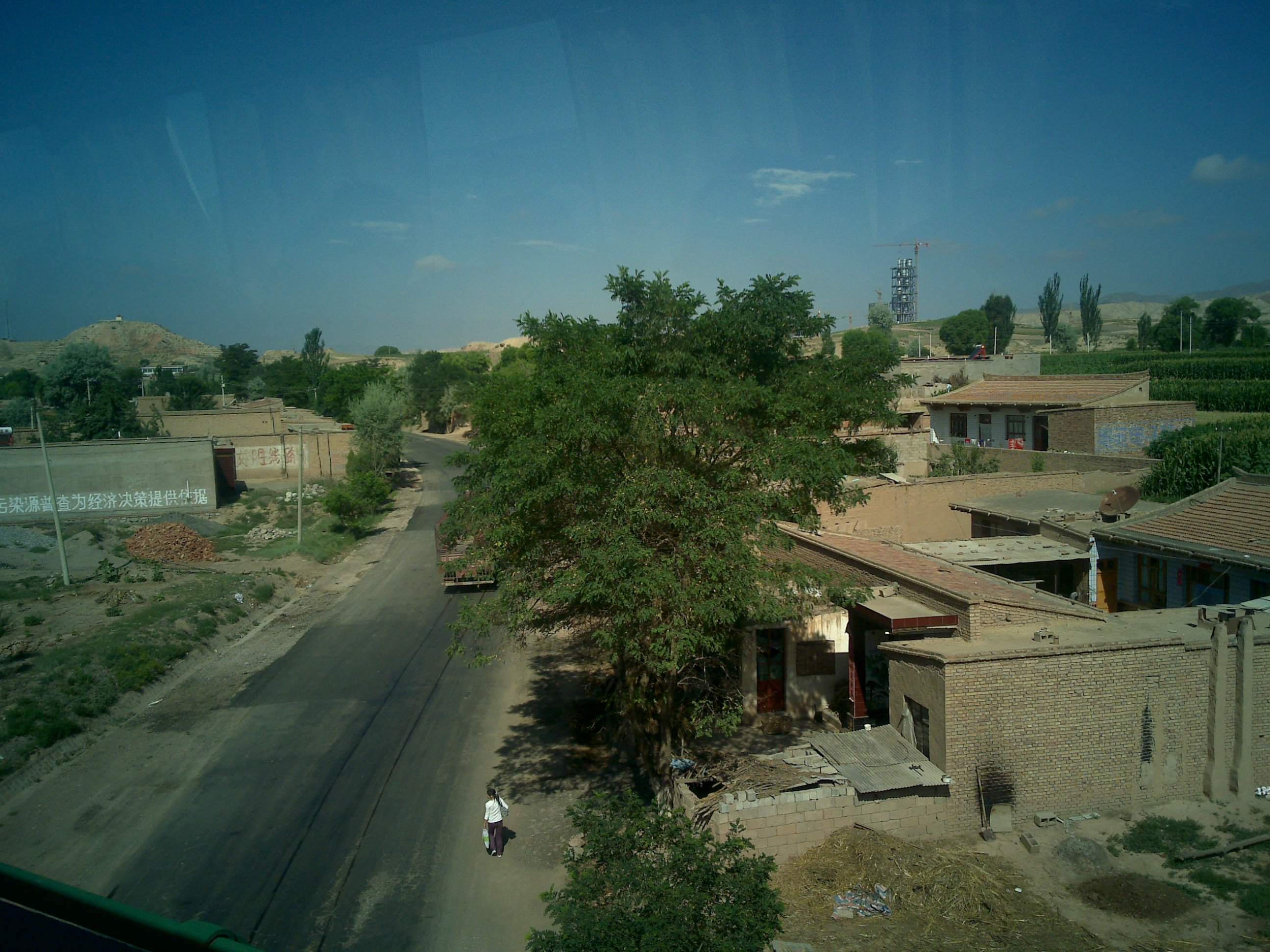 兰州到临洮高速-3